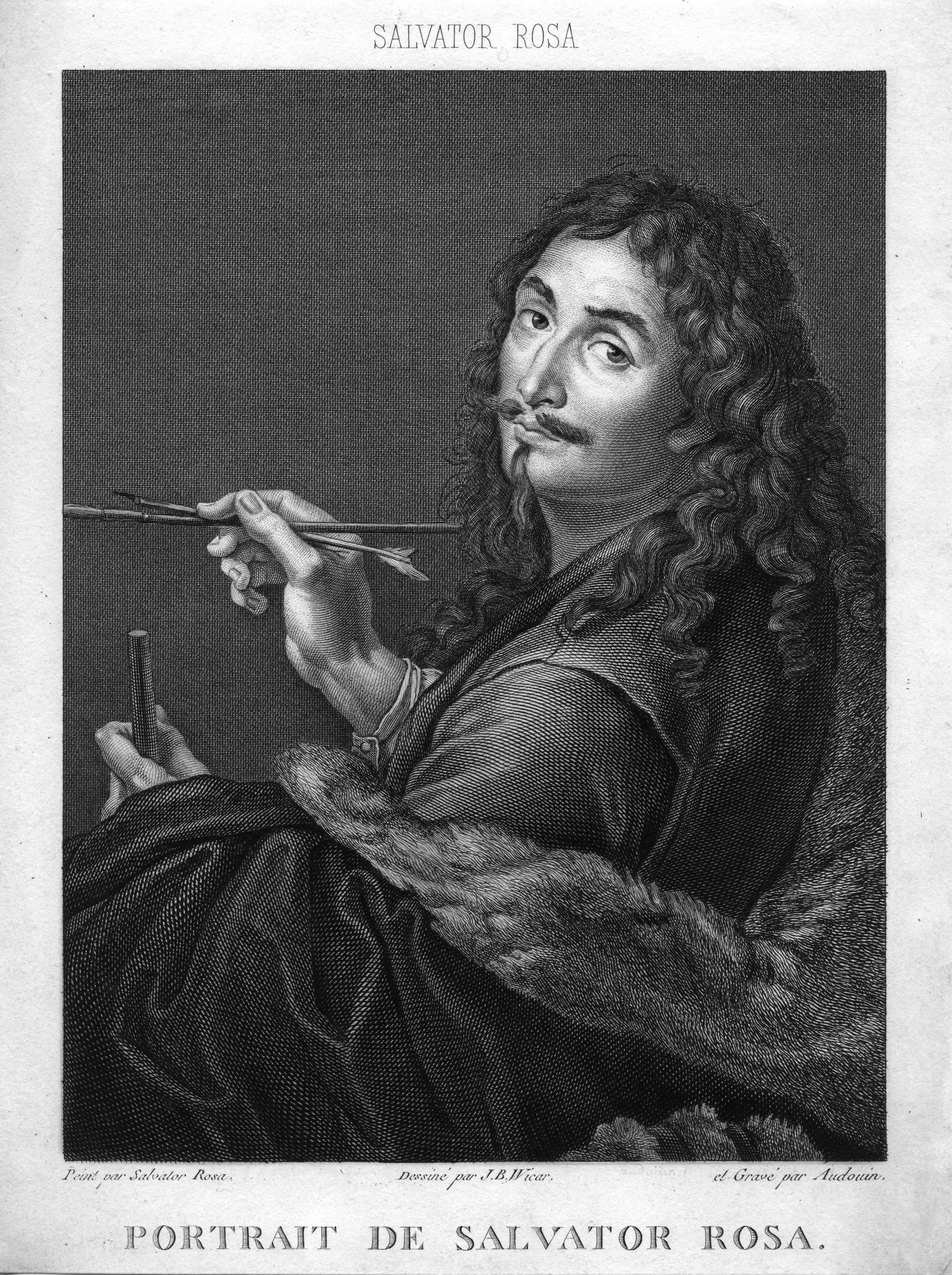 portrait gravé